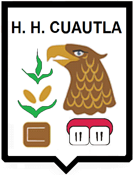 Escudo de la ciudad de Cuautla, Morelos.